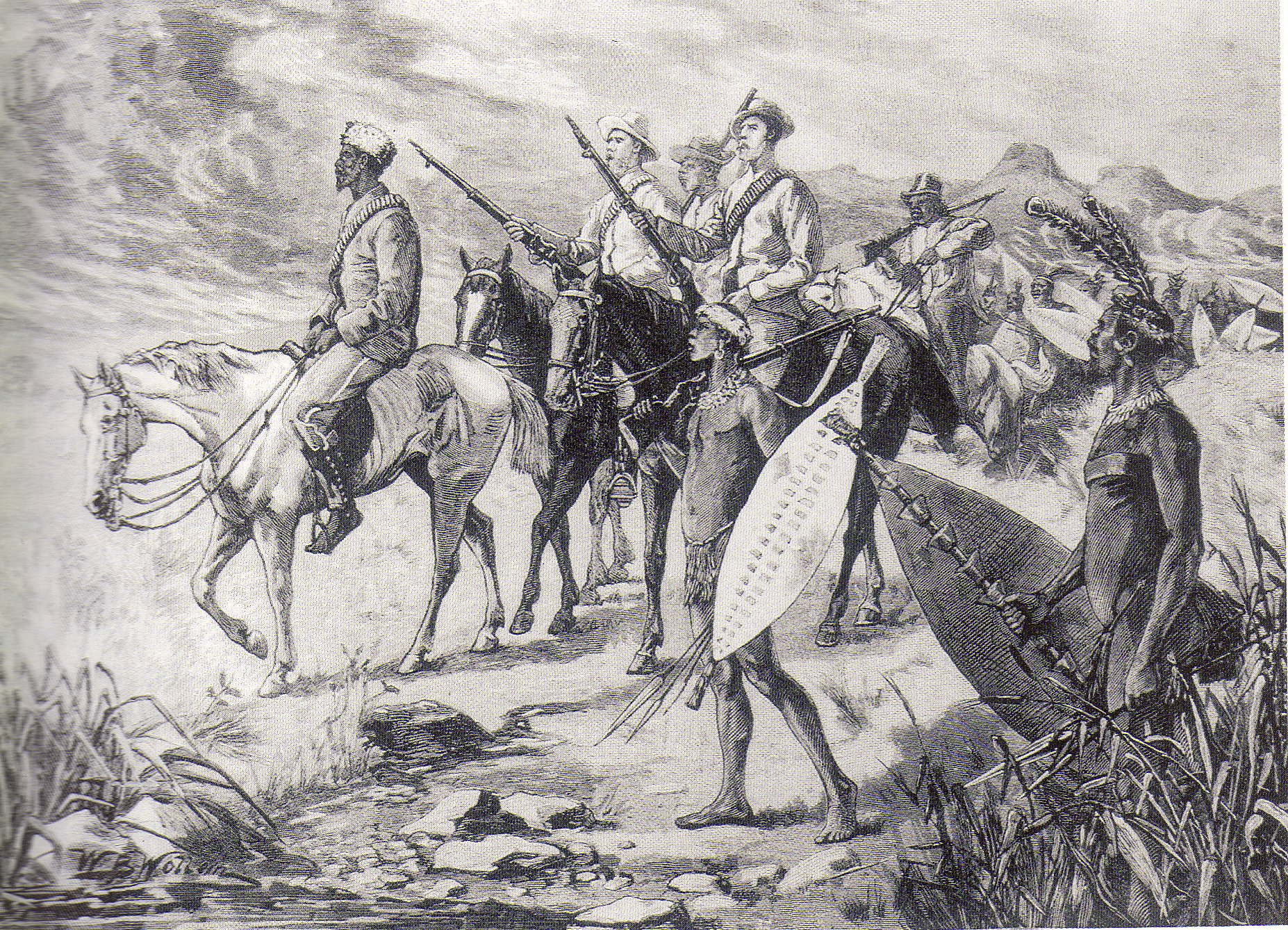 Gravure de Walton parue en 1883 dans le Pictorial World, représentant le chef mandlakazi Zibhebhu, à la tête de ses troupes après sa victoire d'oNdini, le 21 juillet 1883